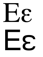 greek letter epsilon